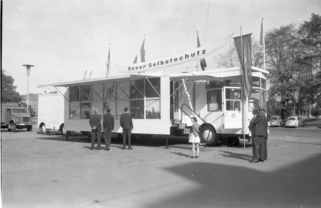 auf dem Rathausplatz.